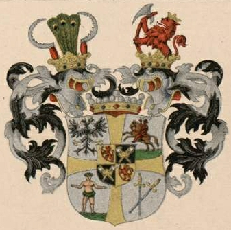 Meyendorffi suguvõsa vabahärravapp